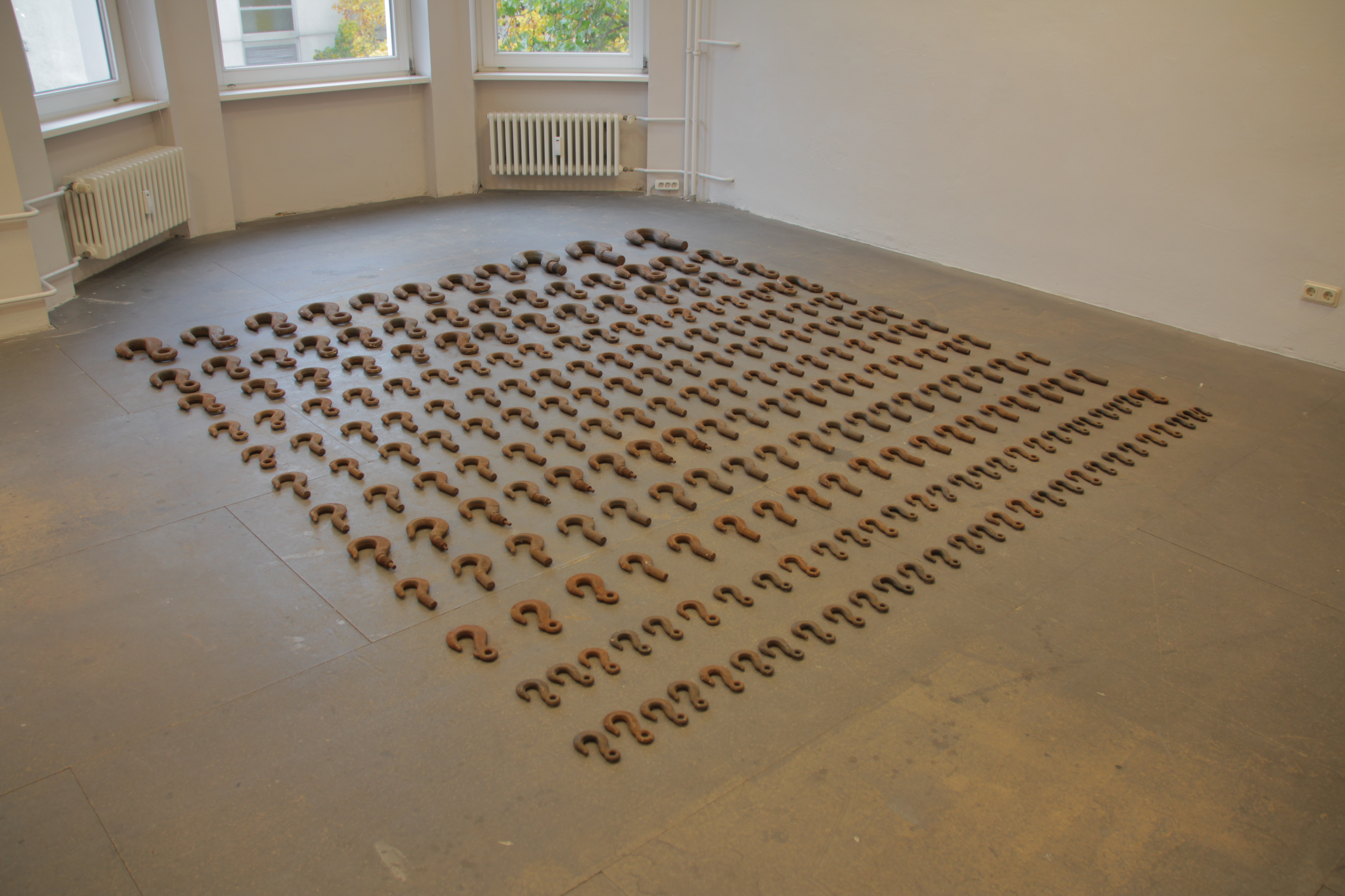 Installation Bolzani 1990 Kranhaken aus einer Zulieferfabrik Berlin Wedding